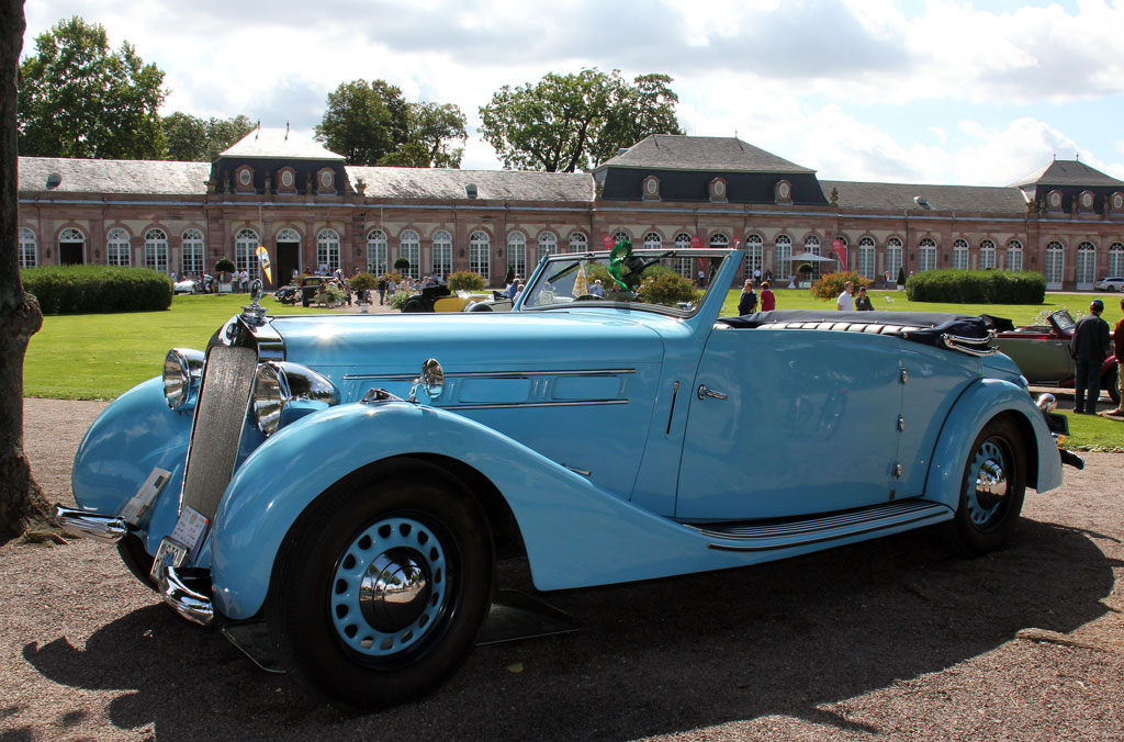 1937 Delage D6.60 Cabriolet_IMG_1045